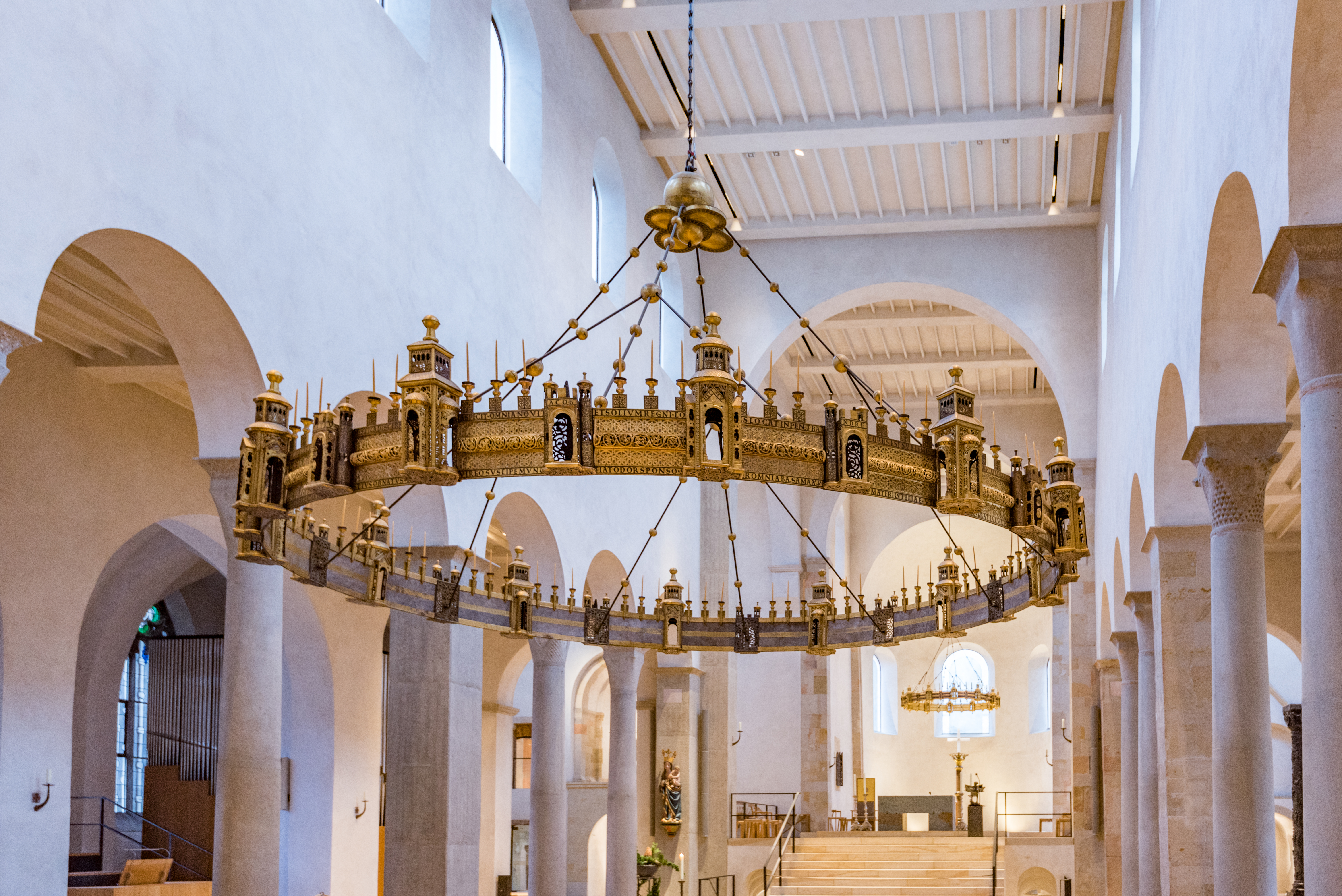 Hildesheim, Domhof, Dom, Heziloleuchter